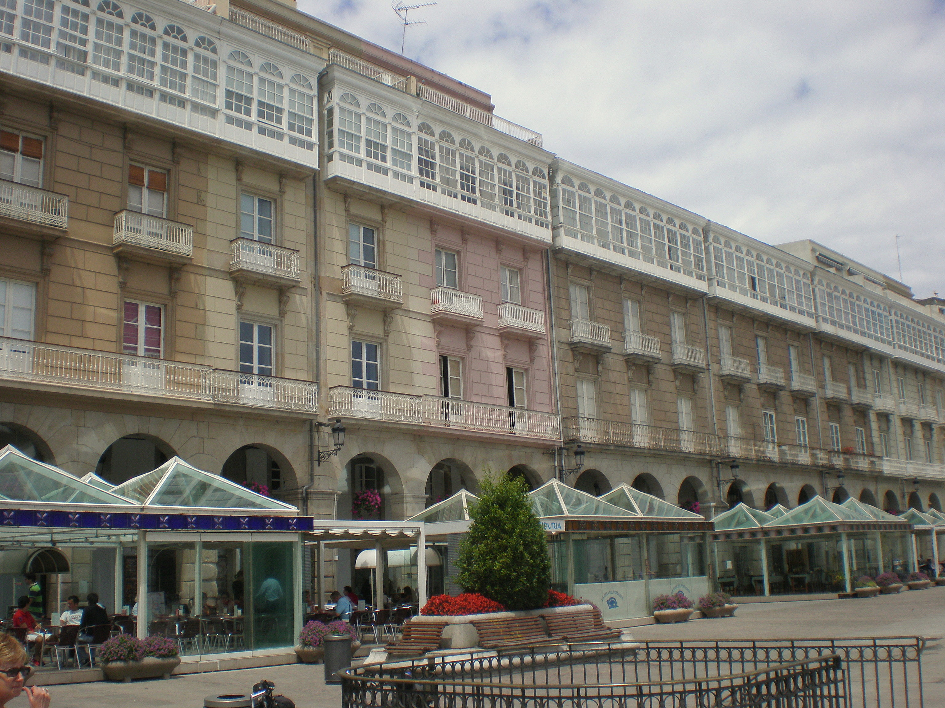 Praza de María Pita, A Coruña.jpg